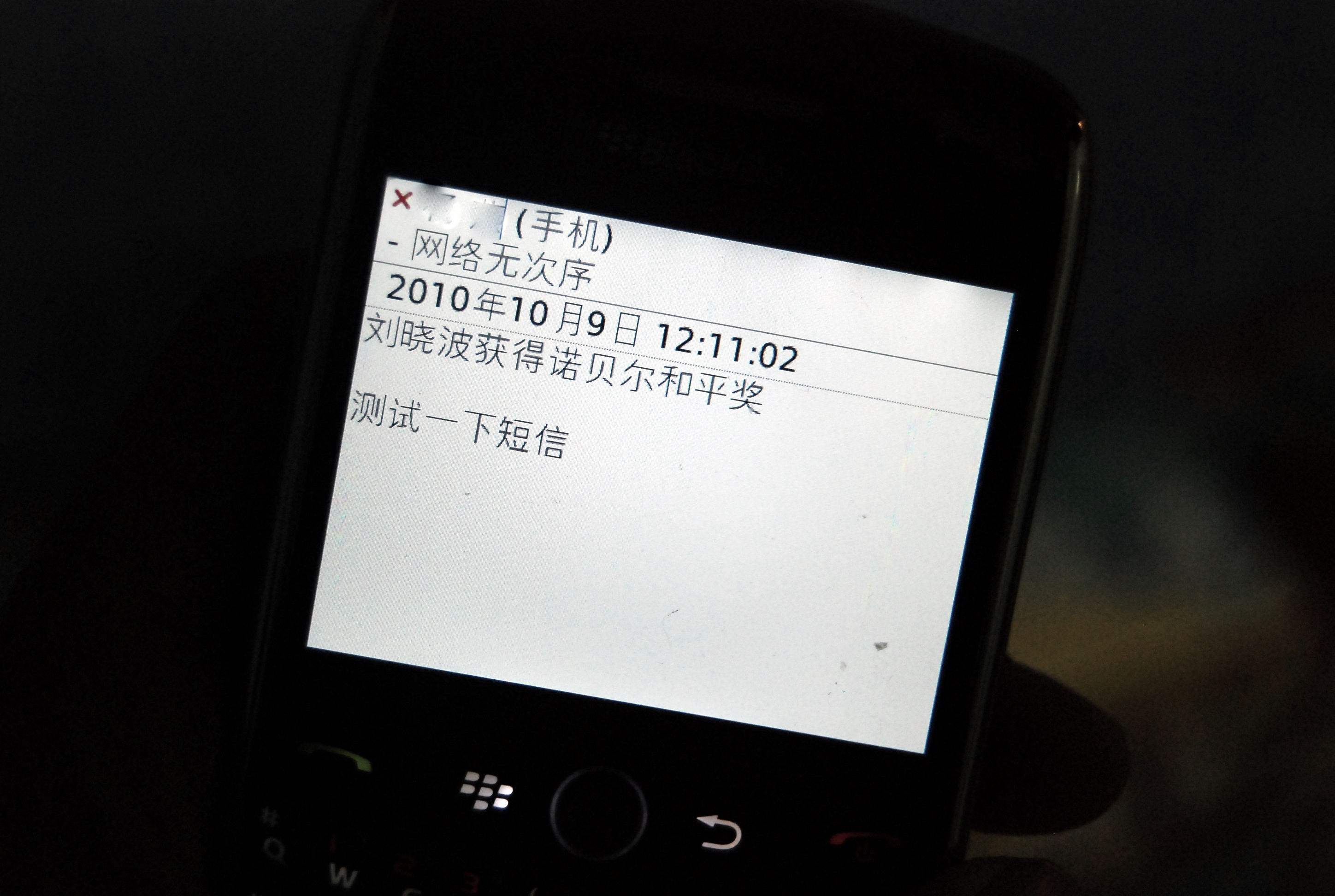 短信发送失败：网络无次序（这是什么意思？）